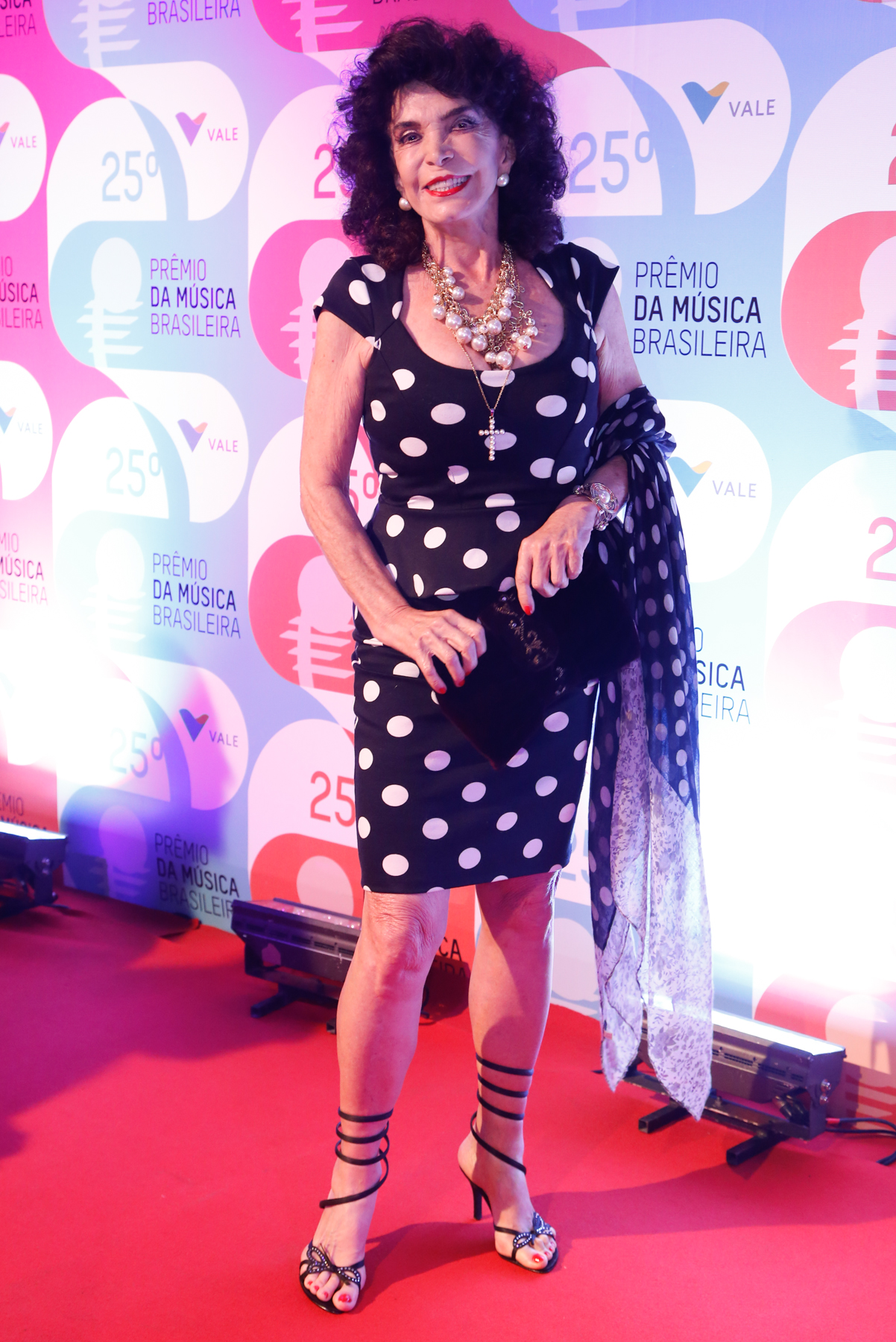 Lady Francisco durante o 25º Prêmio da Música Brasileira no Theatro Municipal. Foto: Roberto Filho (14/05/14)